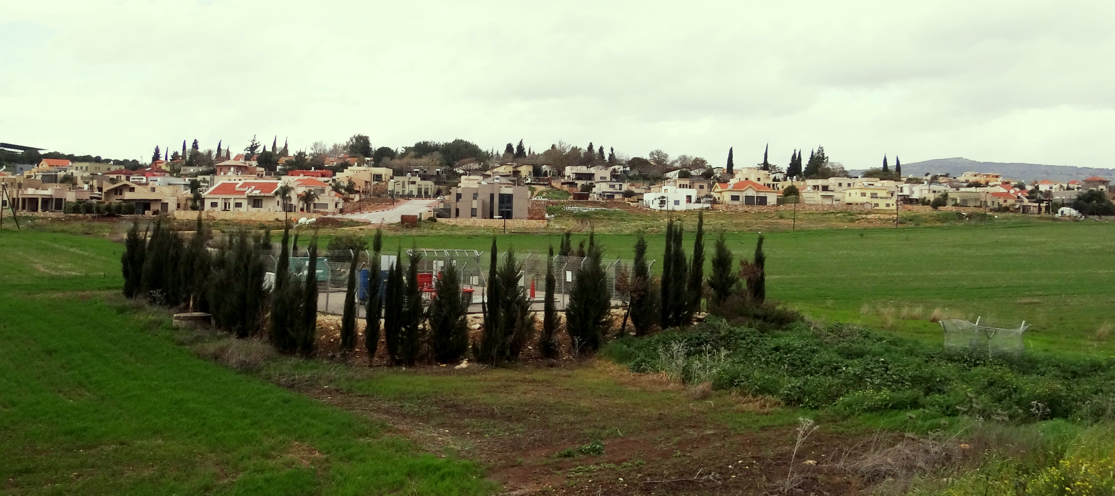 Hanaton is a kibbutz in northern Israel חנתון הוא קיבוץ והרחבה קהילתית בגליל התחתון, הנמצא בשוליים המערביים של בקעת בית נטופההירדן